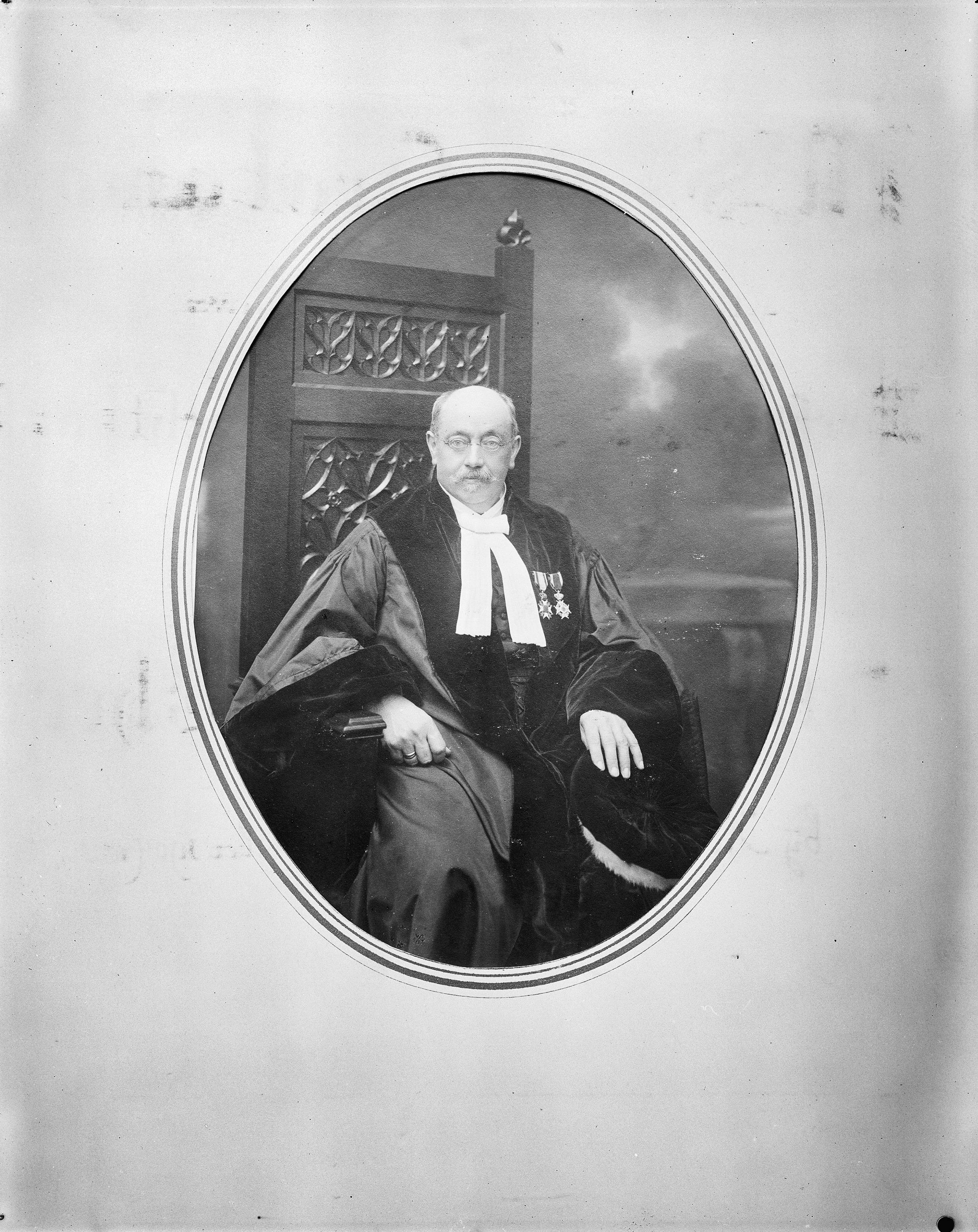 DIVERSEN: Mr. S. Gratama foto